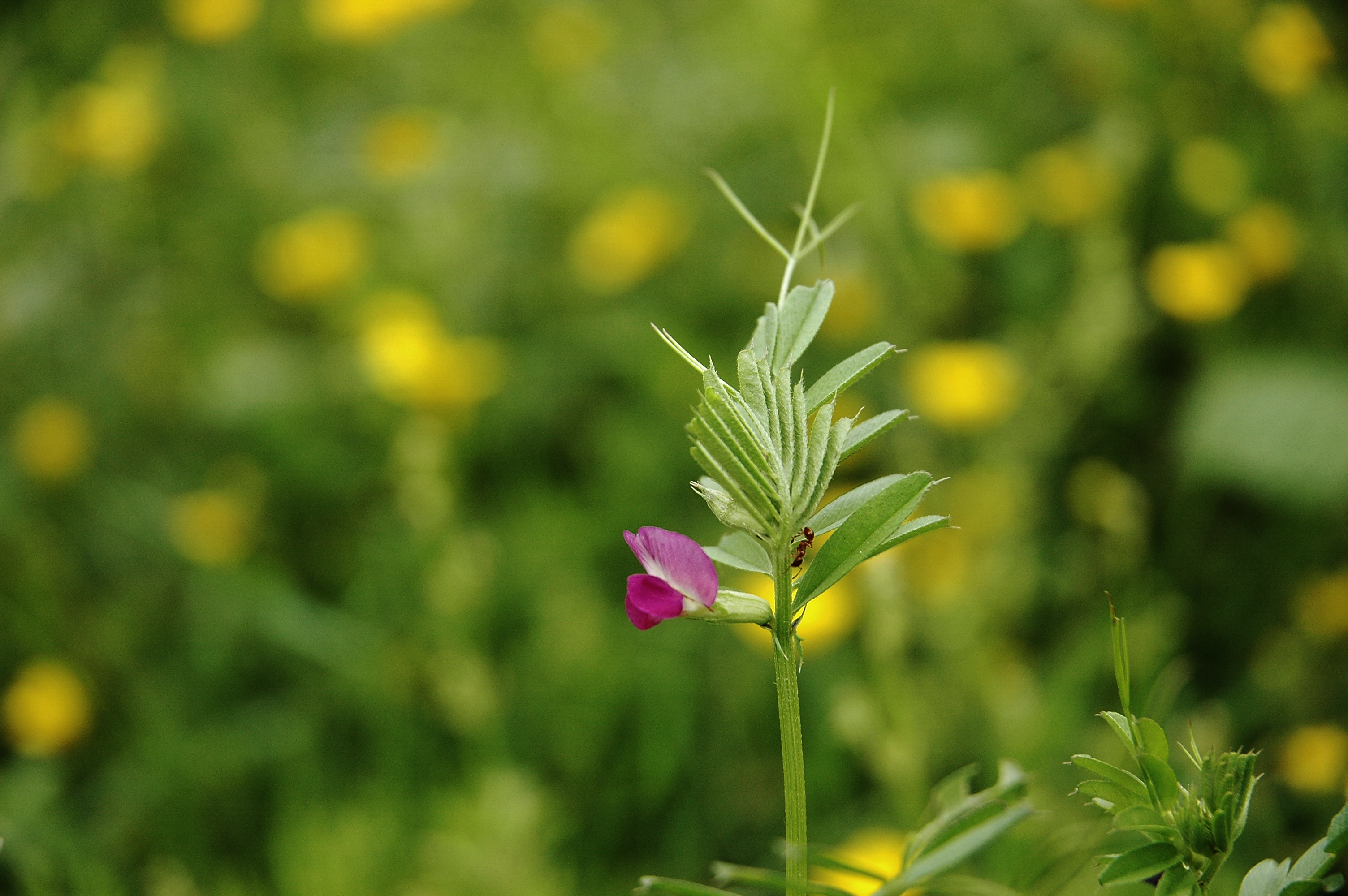 Vicia sativa (Aisne)